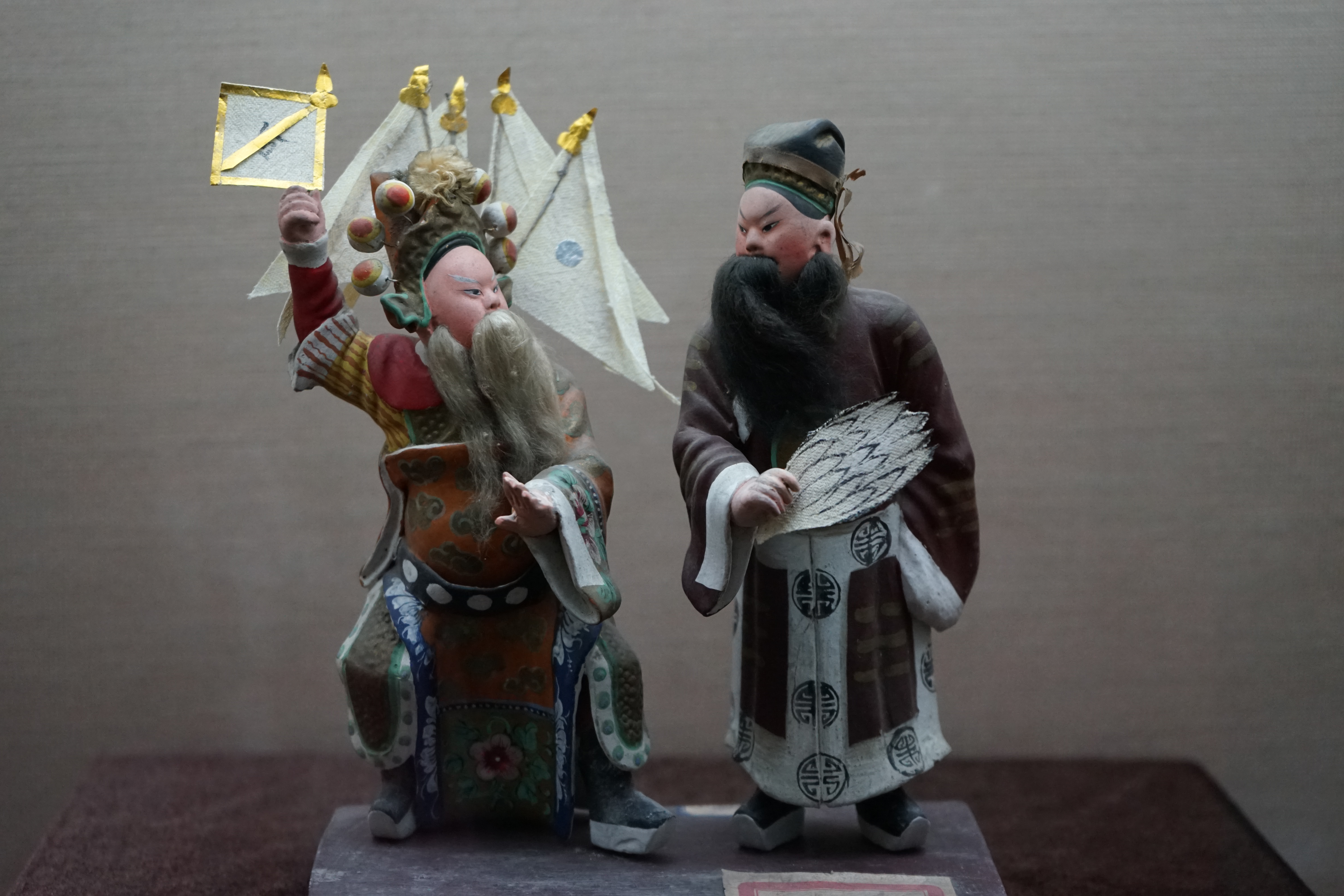 中文（中国大陆）: 《定军山》。无锡博物馆